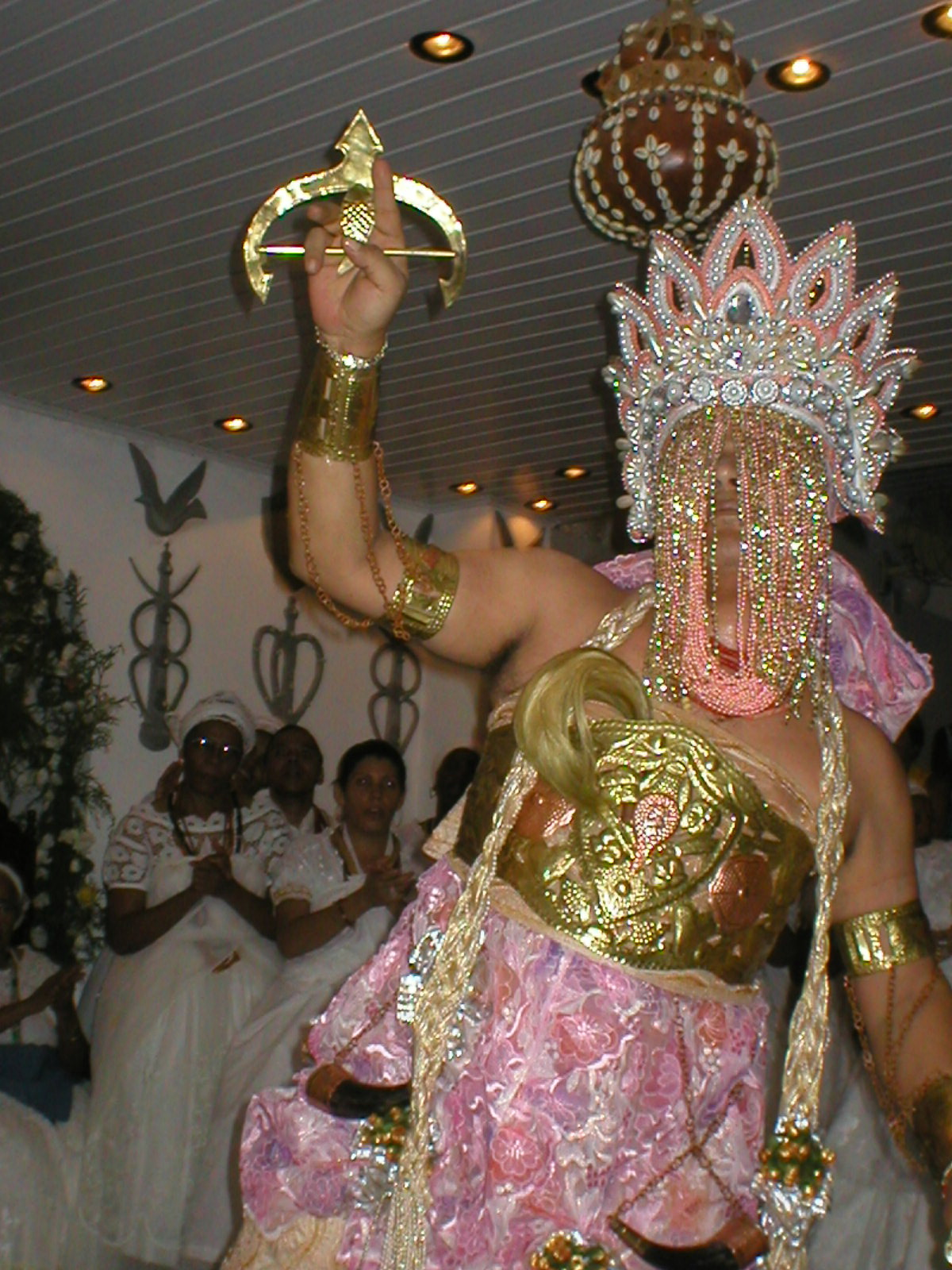 Orixá Oba, Ile Ase Orossi